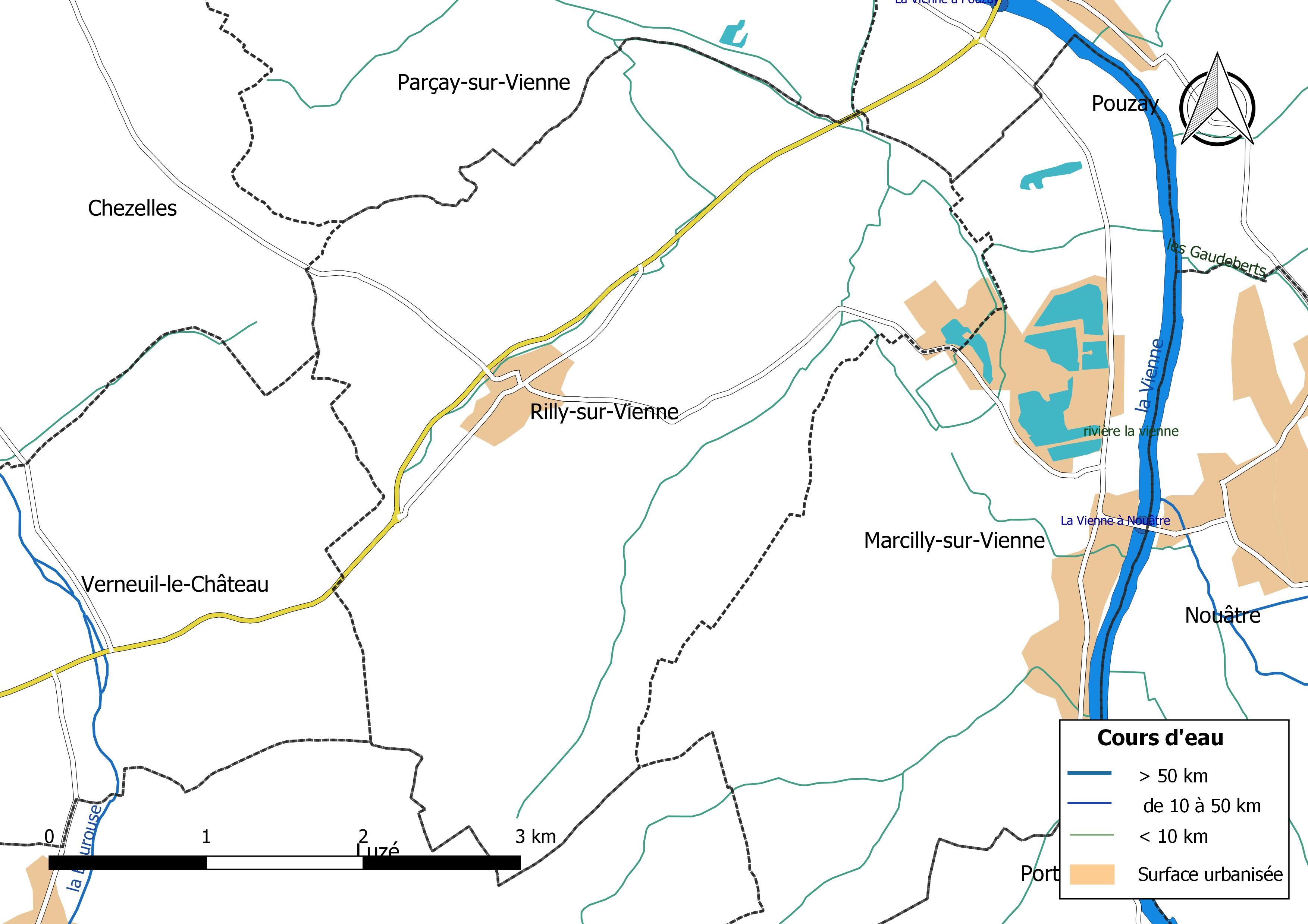 Carte du réseau hydrographique de la commune de Rilly-sur-Vienne (France).